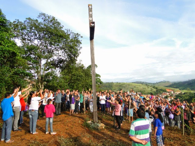 Fiéis católicos em oração no Cruzeiro em Vermelho Novo